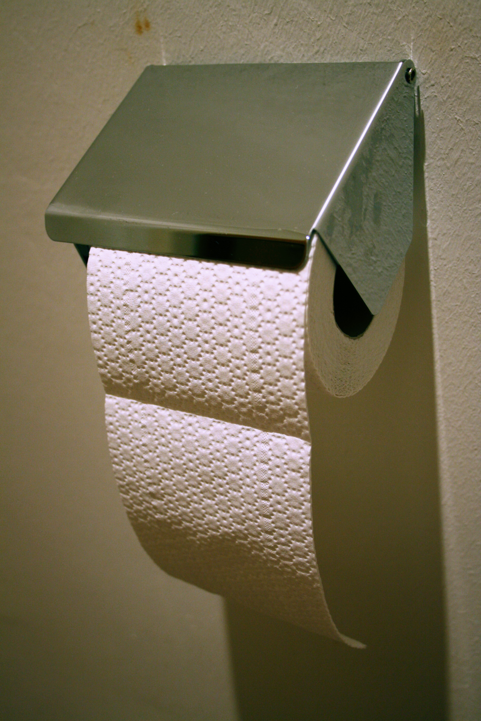 Toilettenappier in Metallhalterung.